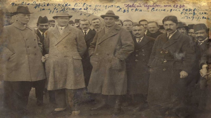 Korce,Pogradec.Nga vizita e perfaqesueseve te Fuqive te Medha, per ceshtjen e kufijve,viti 1922. Mes tyre Sybi Beli (i pari djathtas ne rradhen siper)